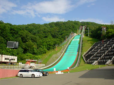 Miyanomori ski jumping hill in Sapporo